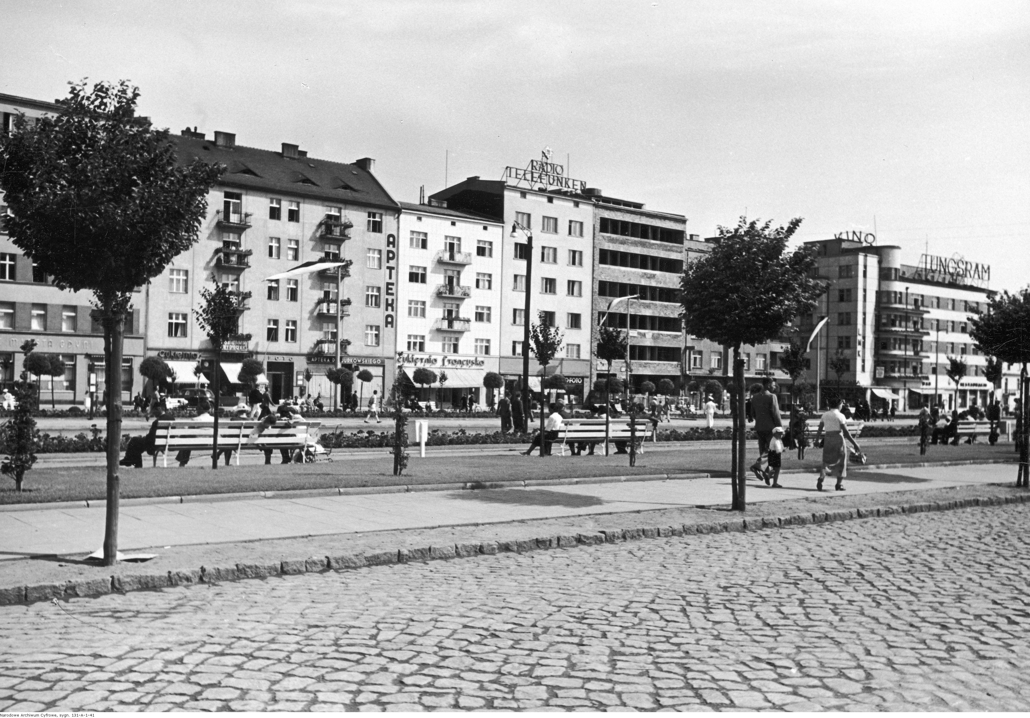 Swer Kościuszki.